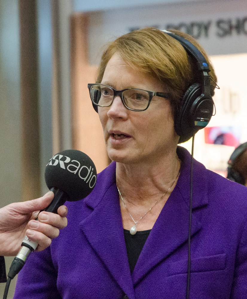 Kerstin af Jochnick på Stockholms Central den 8 februari 2017 med anledning av Sveriges radio/P1:s direktsändning i Studio Ett om minusräntan.